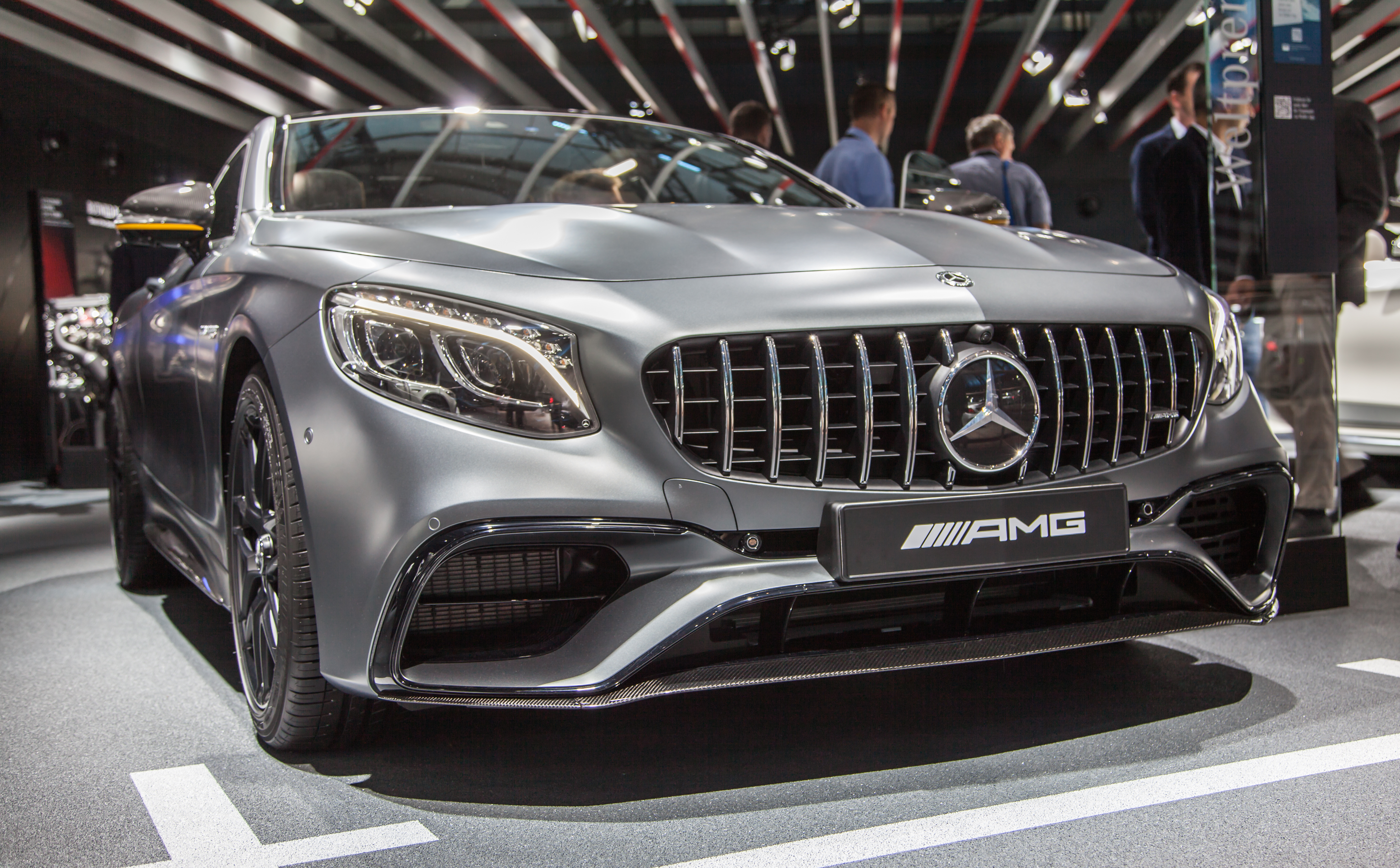 Mercedes-AMG S 63 Coupe